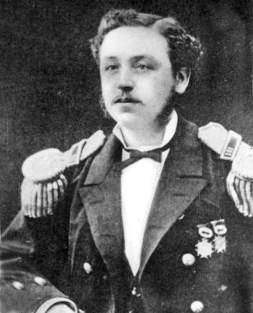 Carlos Arnaldo Condell de la Haza (* Valparaíso, 14 de agosto de 1843 - † Quilpué, 24 de noviembre de 1887) fue un héroe naval chileno. Participó activamente en la guerra Hispano-Sudamericana y en la Guerra del Pacífico.